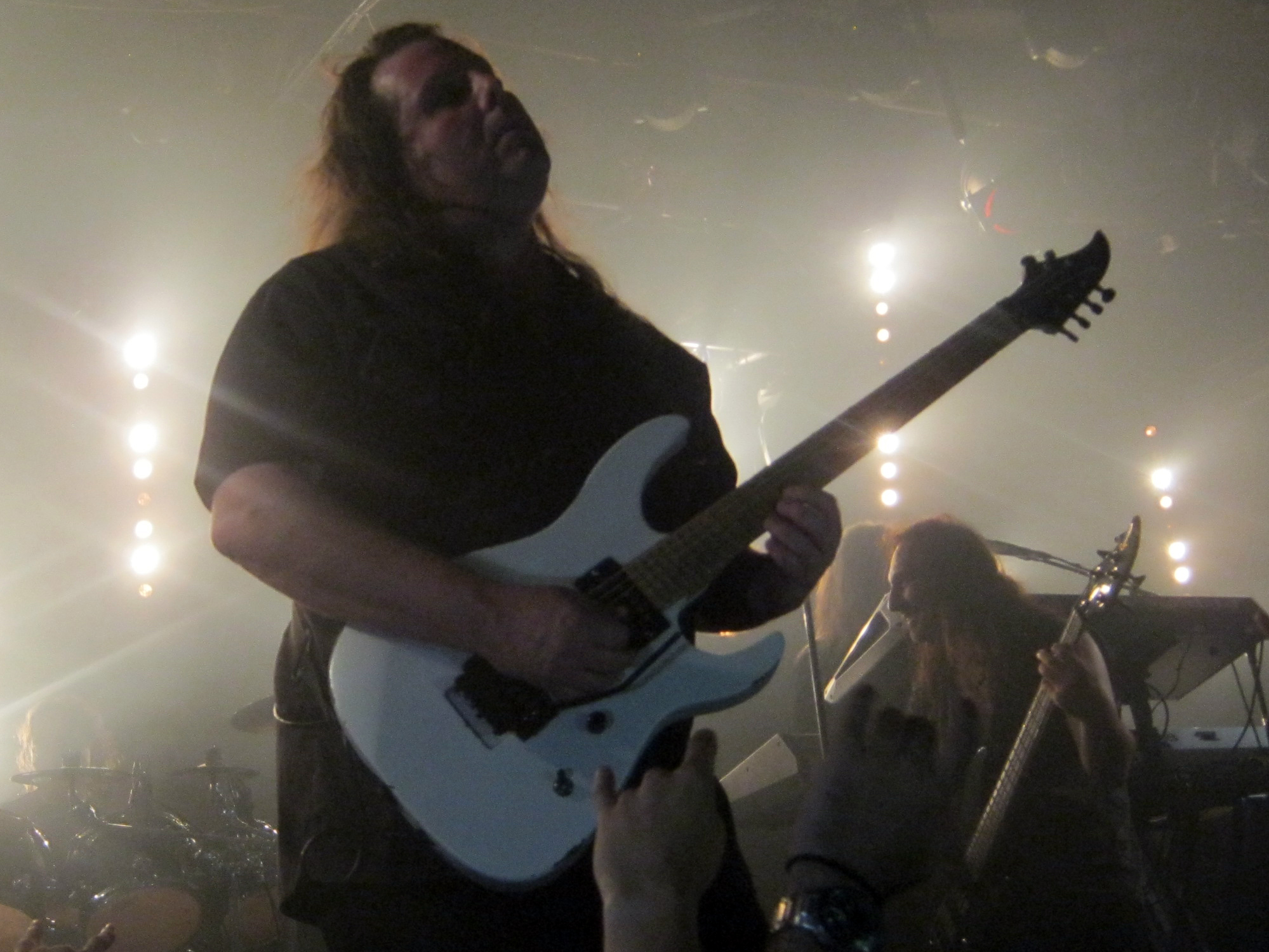 Michael Romeo with Symphony X at Israel. 10/08/16